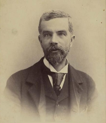 John Murray Thomas (Bridgend, Gales, 6 de septiembre de 1847 - Bryn Crwn, valle inferior del río Chubut, 1924) fue un galés llegado a la Patagonia en 1865. Fue comerciante, explorador, fotógrafo, buscador de oro, comisario y subperfecto.